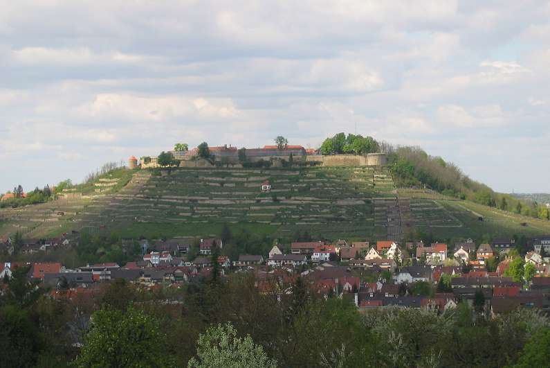 Asperg und Hohenasperg, vom Kleinaspergle aus gesehen